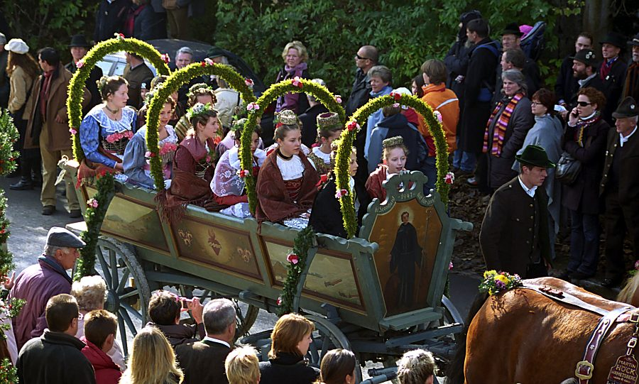 Truhenwagen bei der Leonhardifahrt in Bad Tölz 2006 Photograph: Florian Schott